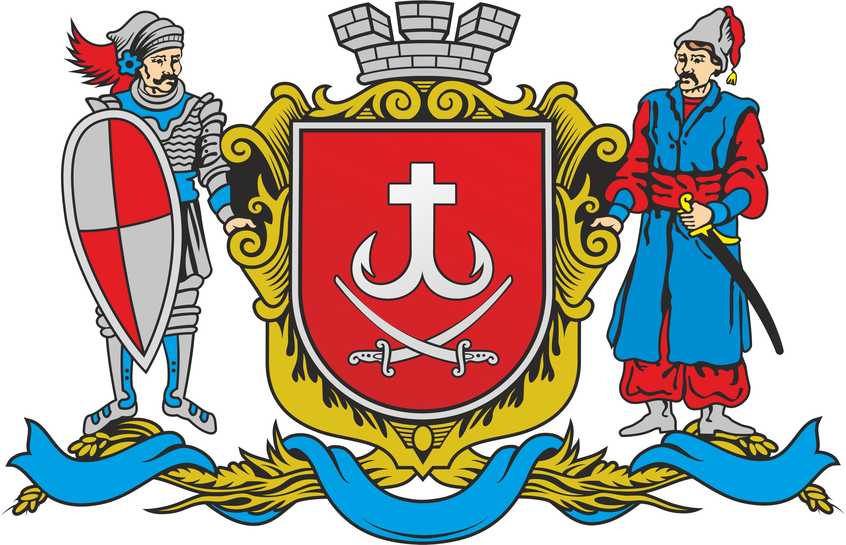 Герб Вінниці